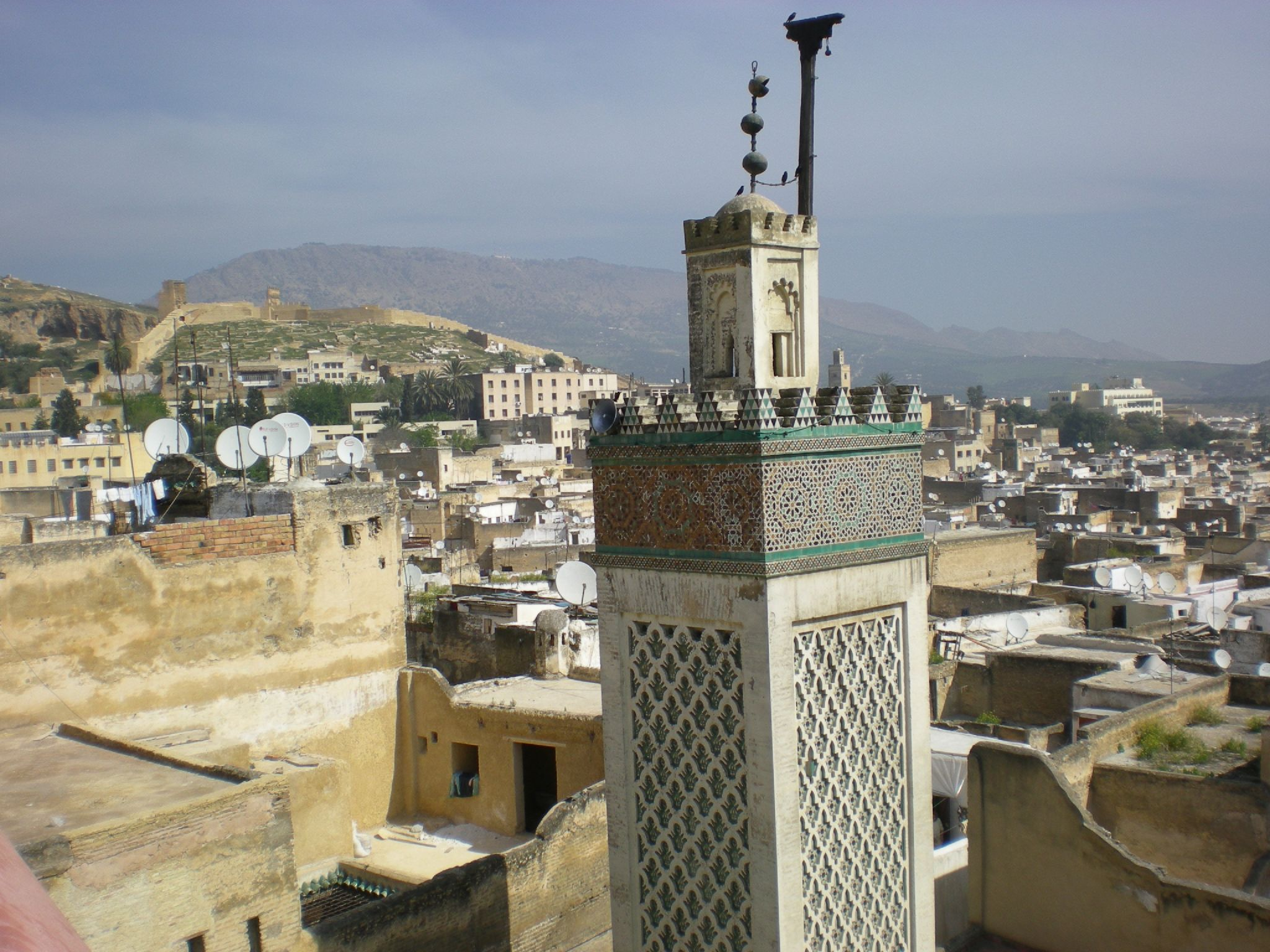 Fès